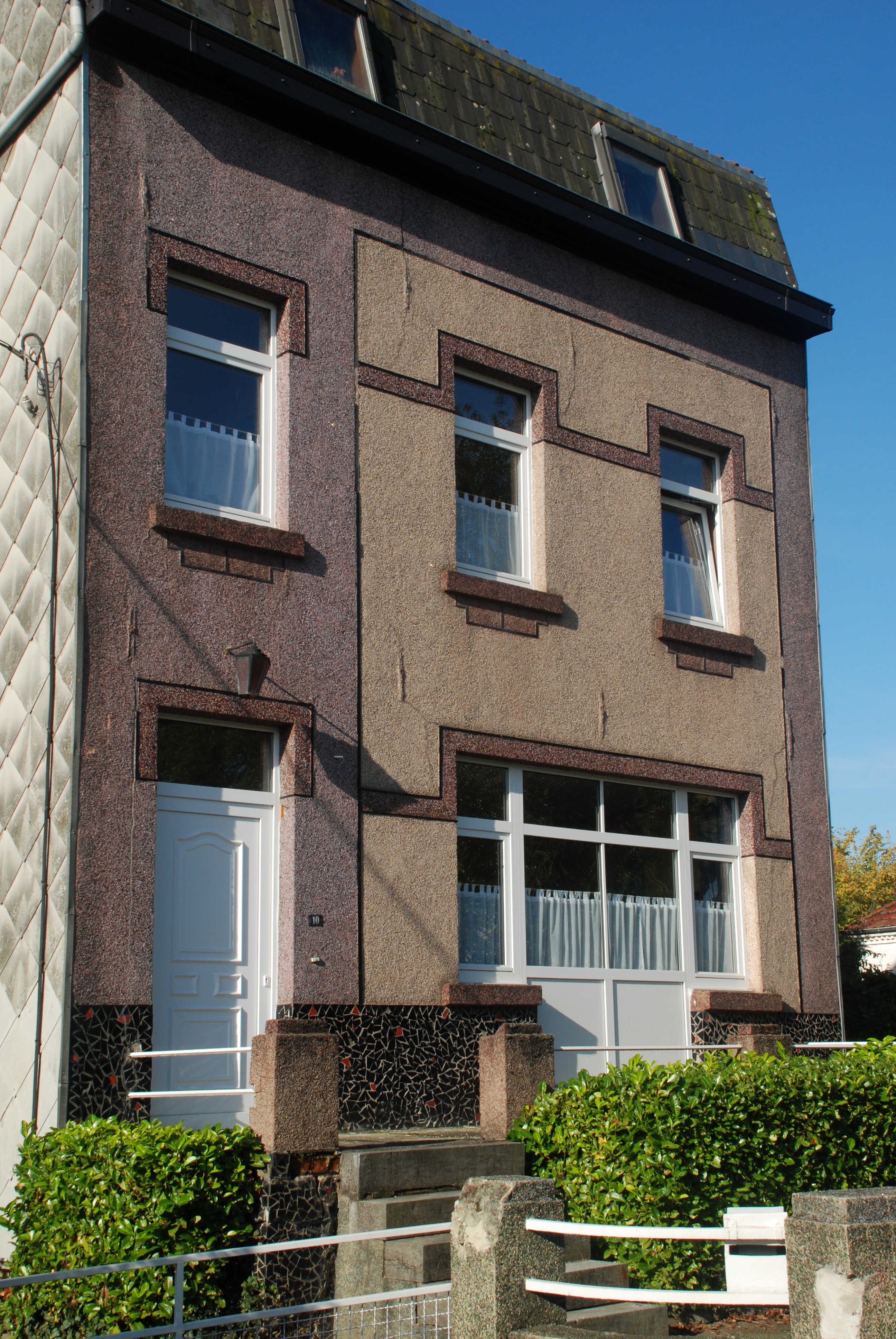 Belgique - Ottignies - façade en cimorné - Art déco